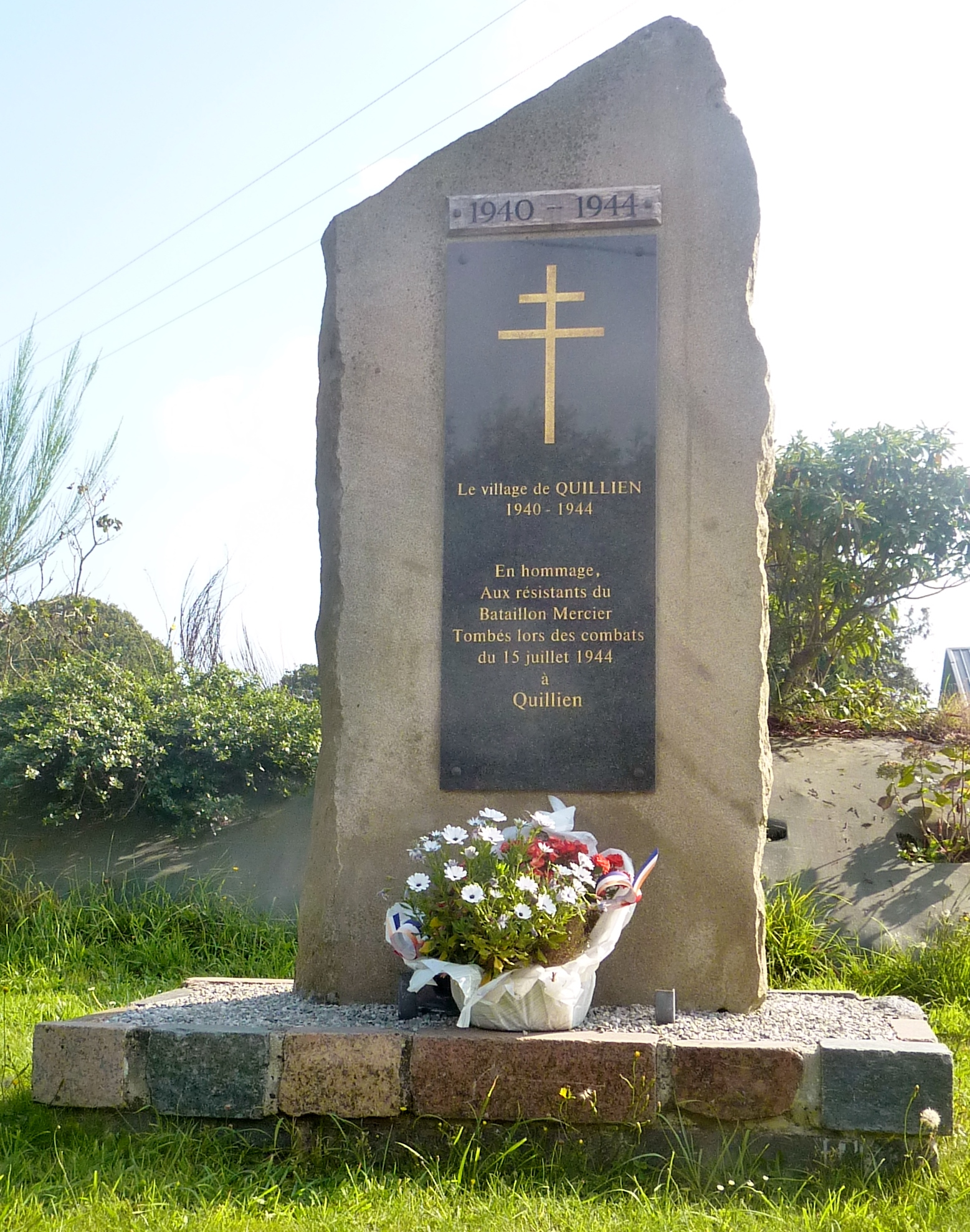 La stèle de Quillien en Tourch commémore les victimes des combats des maquisards FTP des groupes de Scaër et de Rosporden qui eurent lieu le 15 juillet 1944 dans la zone de Kernabat (en Scaër) et de Quillien (en Tourch).